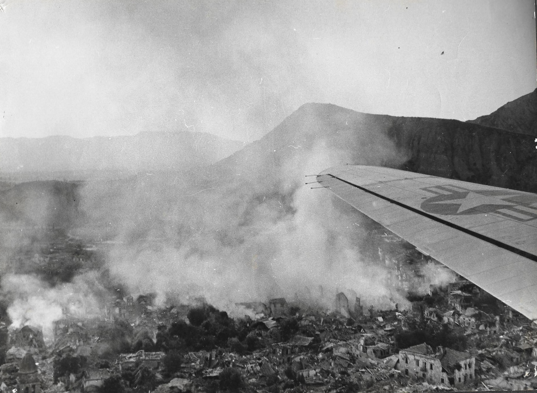 הרס באיים מבט ממטוס אמריקאי